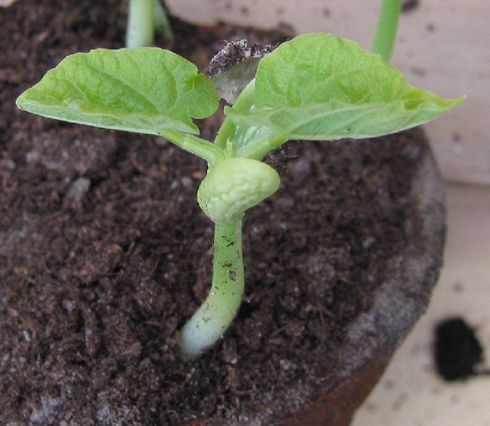 Phaseolus vulgaris